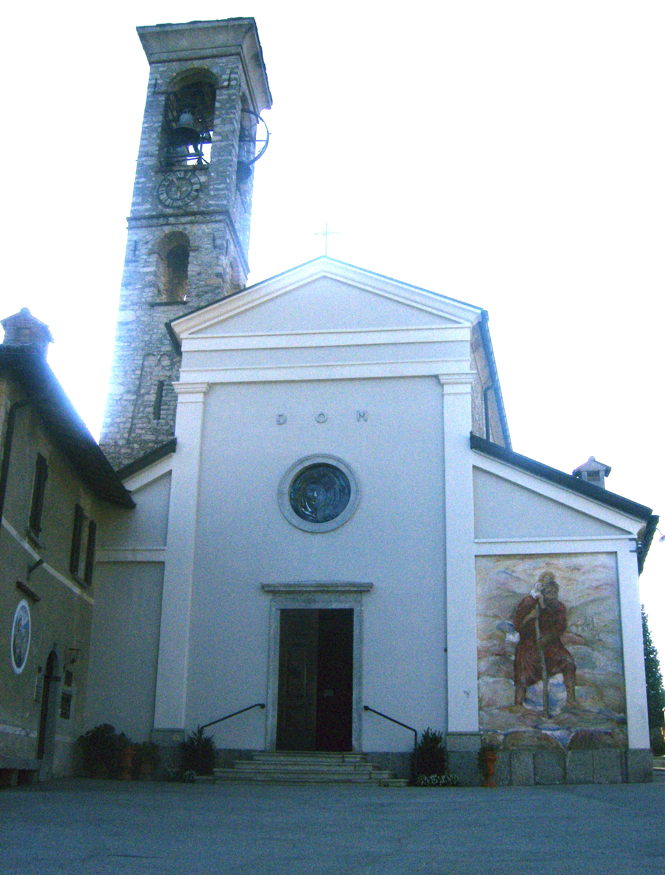 Chiesa dei SS. Simone e Fedele a Brè, frazione di Lugano